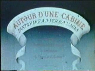 Emile Reynaud - 1895 - Autour d'une Cabine 0001